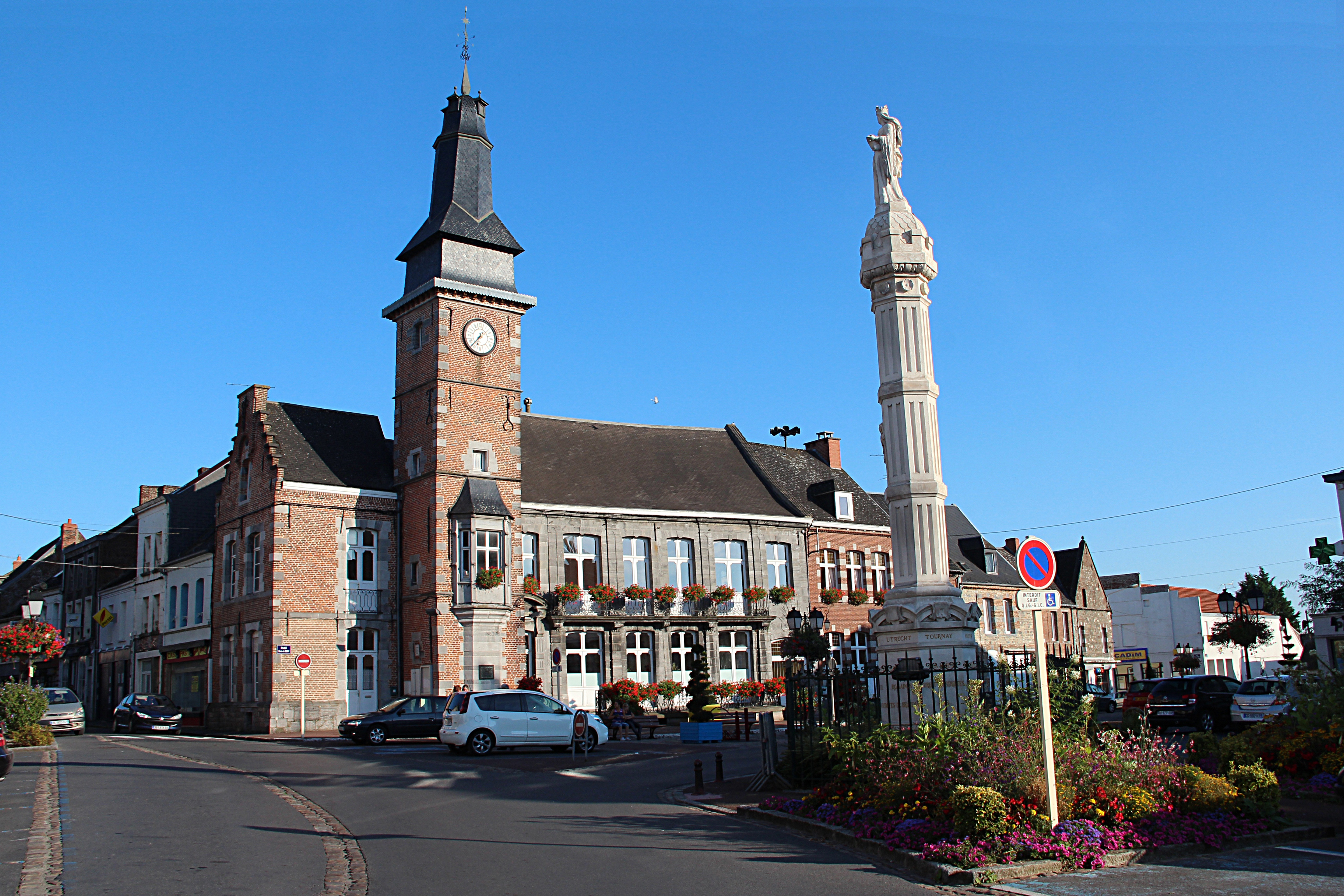 La place Charles de Gaule, Bavay (département du Nord, France).